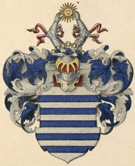 Dückeri suguvõsa aadlivapp